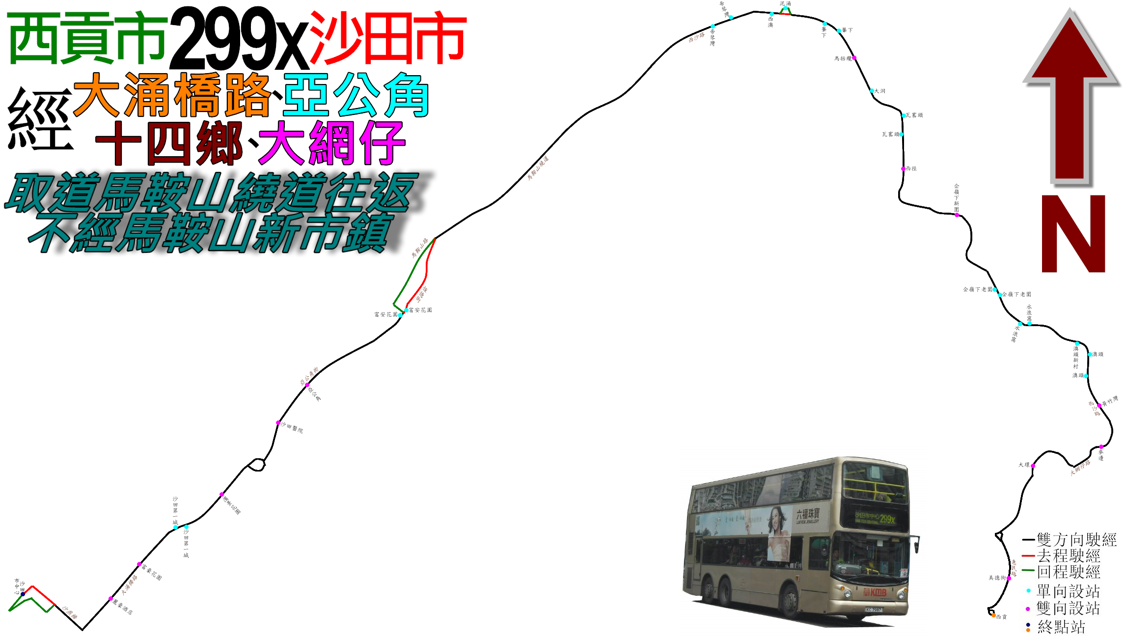 中文（香港）: 九巴299X線的走線圖